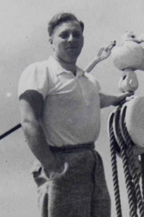 Werner Haberkon no navio que o trouxe ao Brasil, 1936.